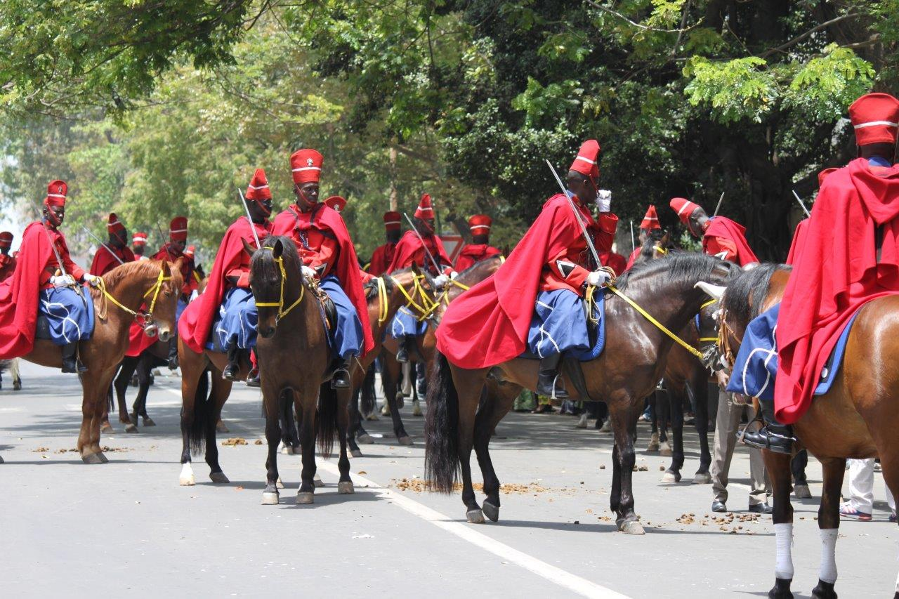 Spahis sénégalais lors de l'Investiture de Macky Sall à Dakar, Sénégal, le 2 avril 2012.